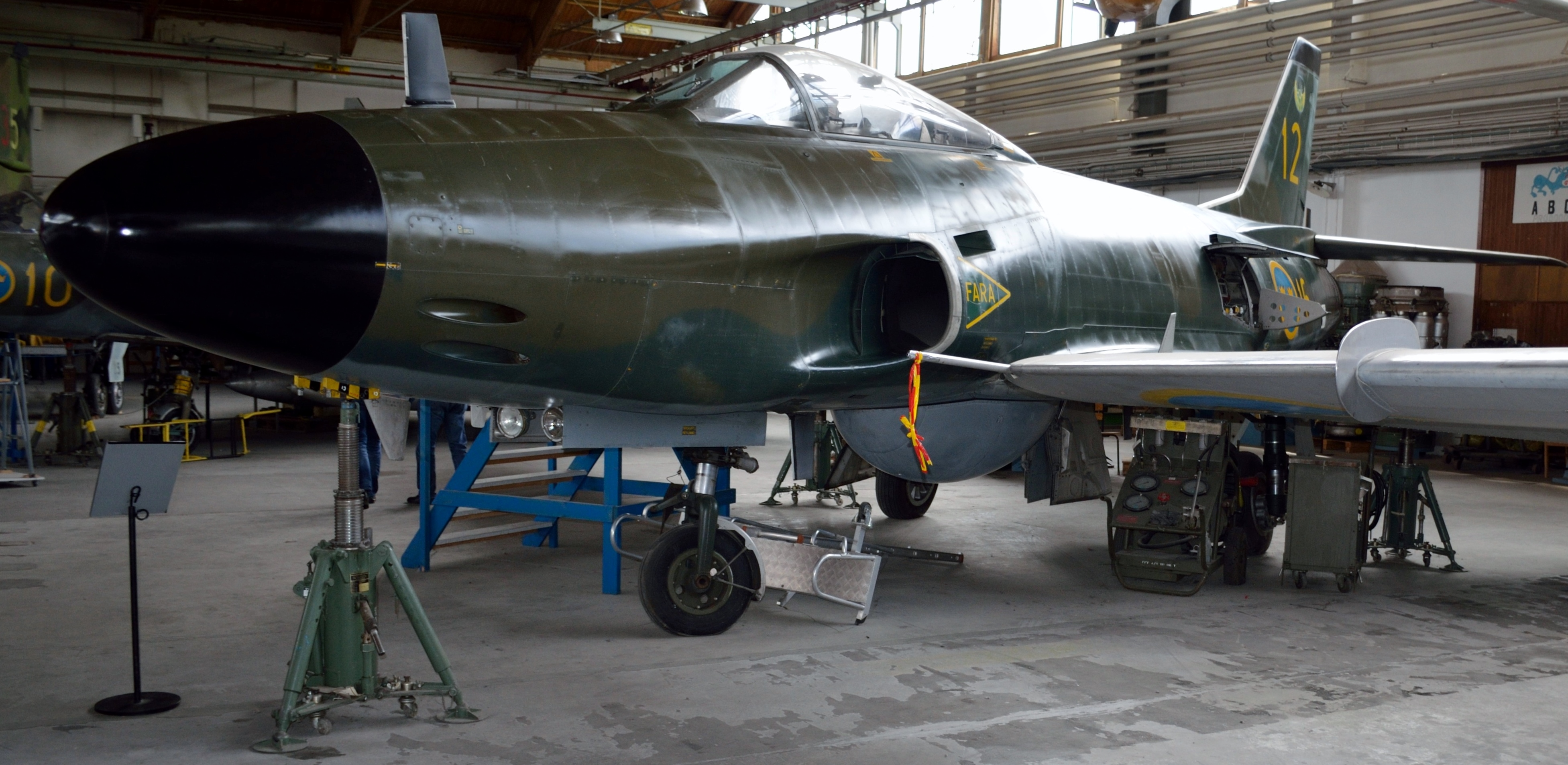 J 32E Lansen vid Västerås flygmuseum. Individen (S/N 32612) är ursprungligen en J 32B men modifierades till J 32E och utrustades med elektronisk störutrustning. J 32 var sedan i tjänst fram till år 1999, då den ersattes av SK 37E.